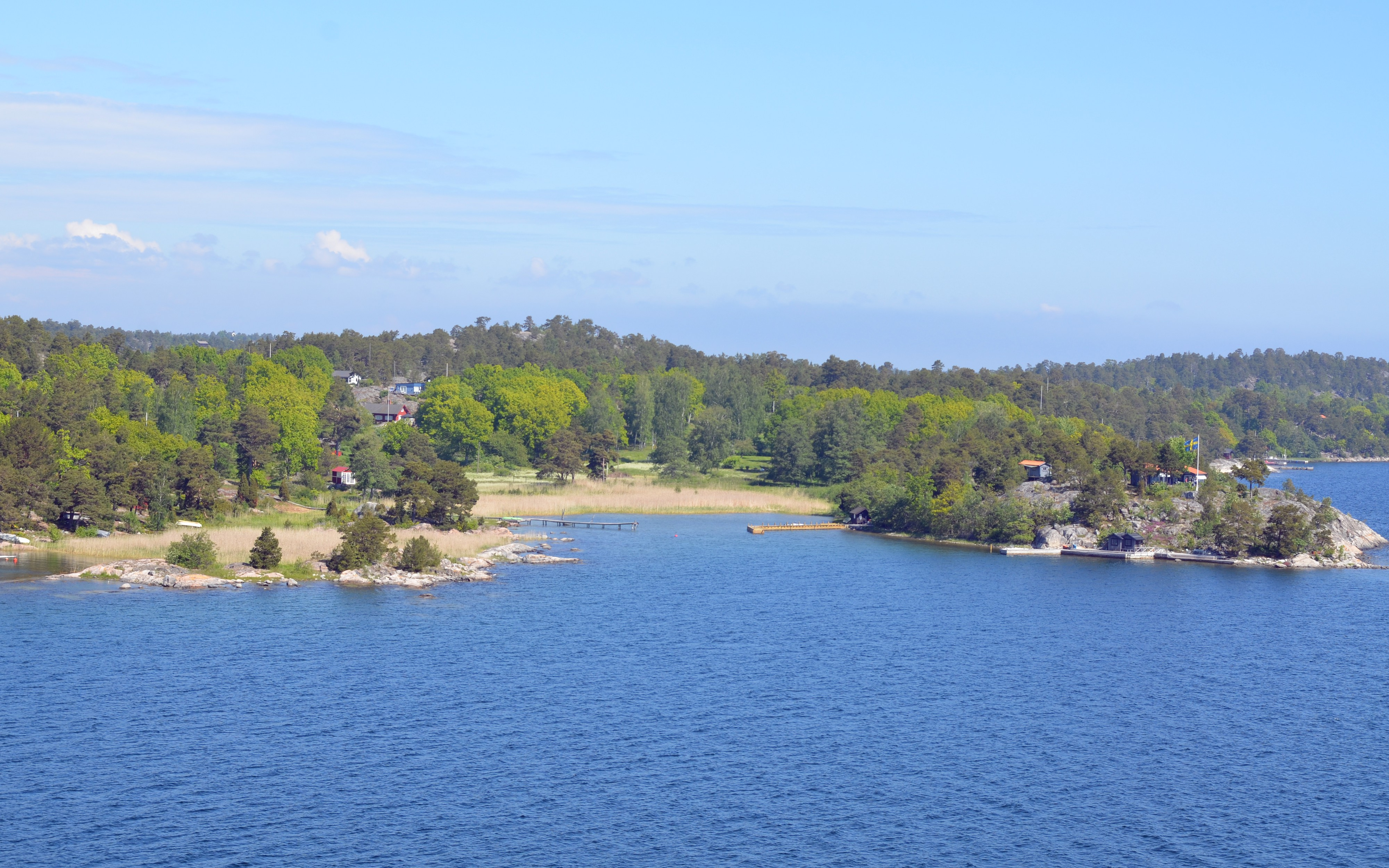 Södra viken på Edesön vid Dalarö i Stockhoms skärgård.